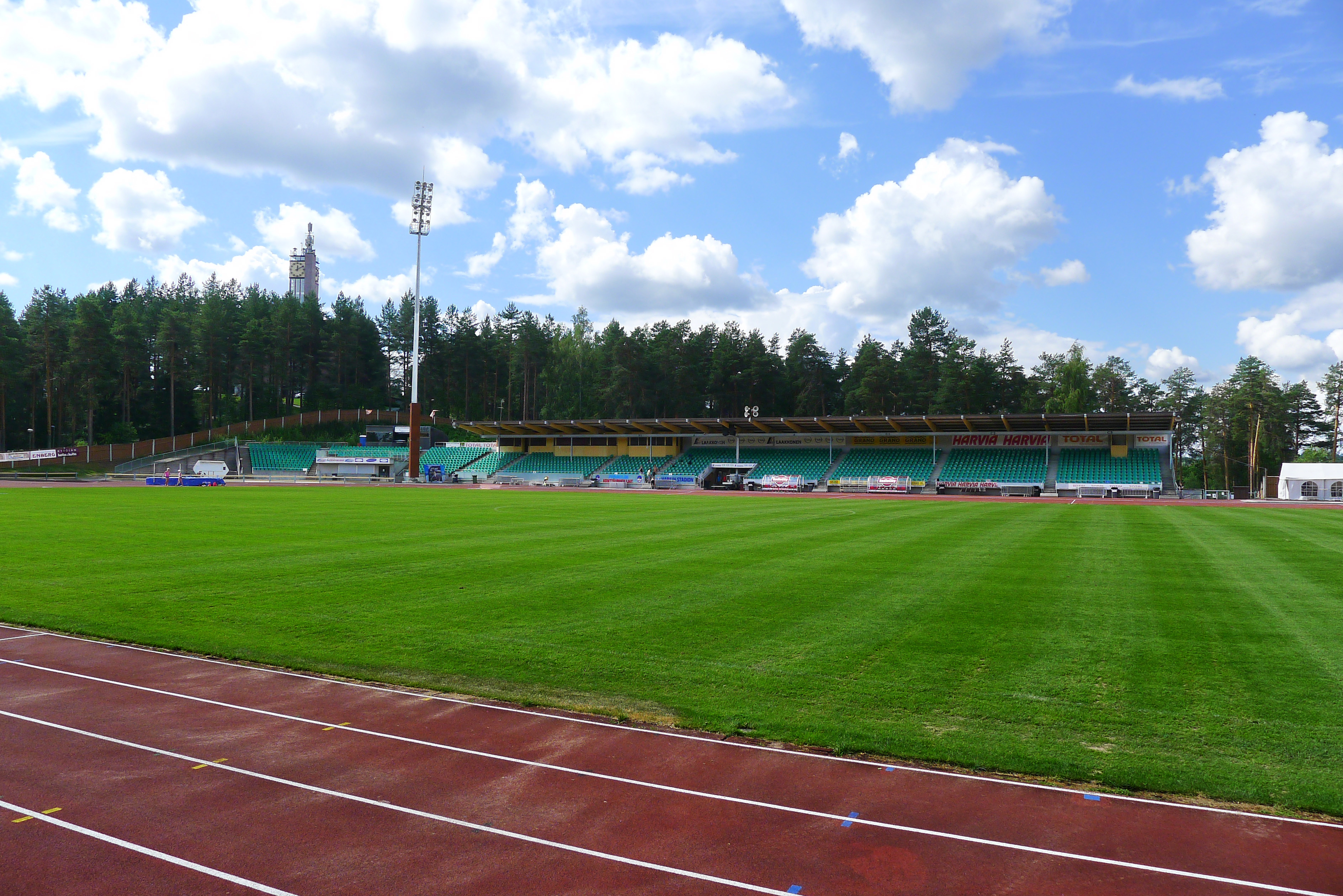 Harjun stadion 18.7.2014